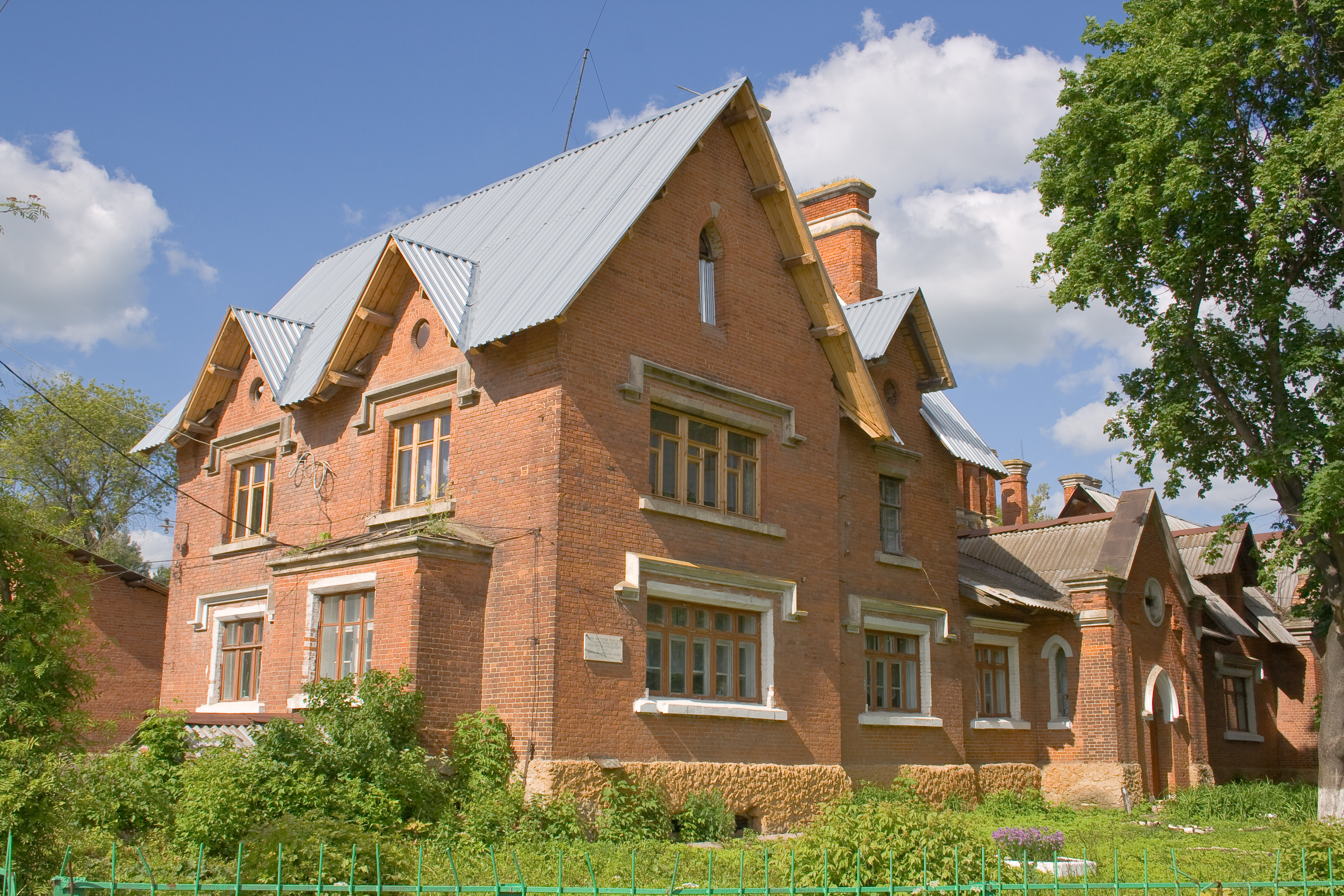 «Дом врача Дуковского Р.Г., 1869 г.» Находится в городе Плавске, по ул. В. Ульянова, 74